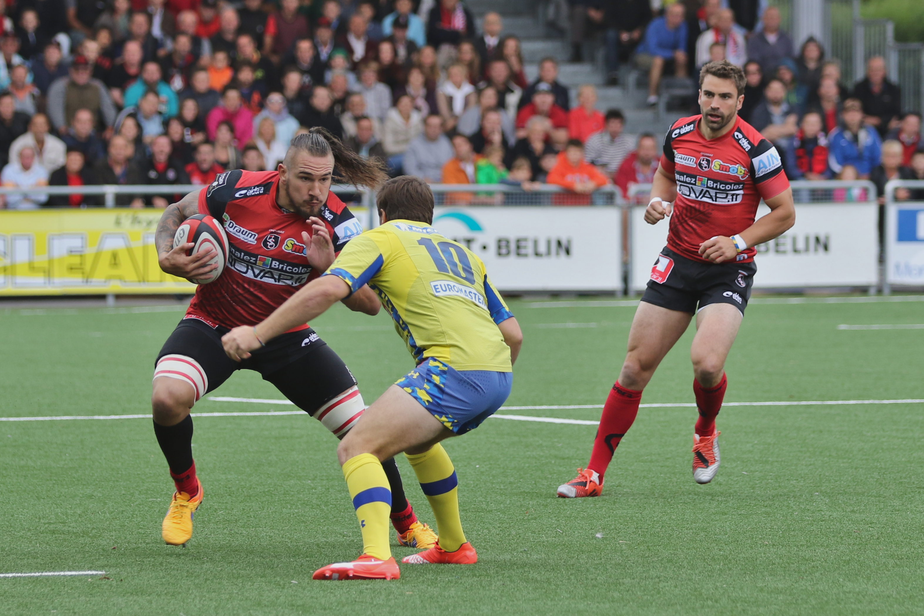 USO - ASM - 20150905 - Pierrick Gunther face à Camille Lopez